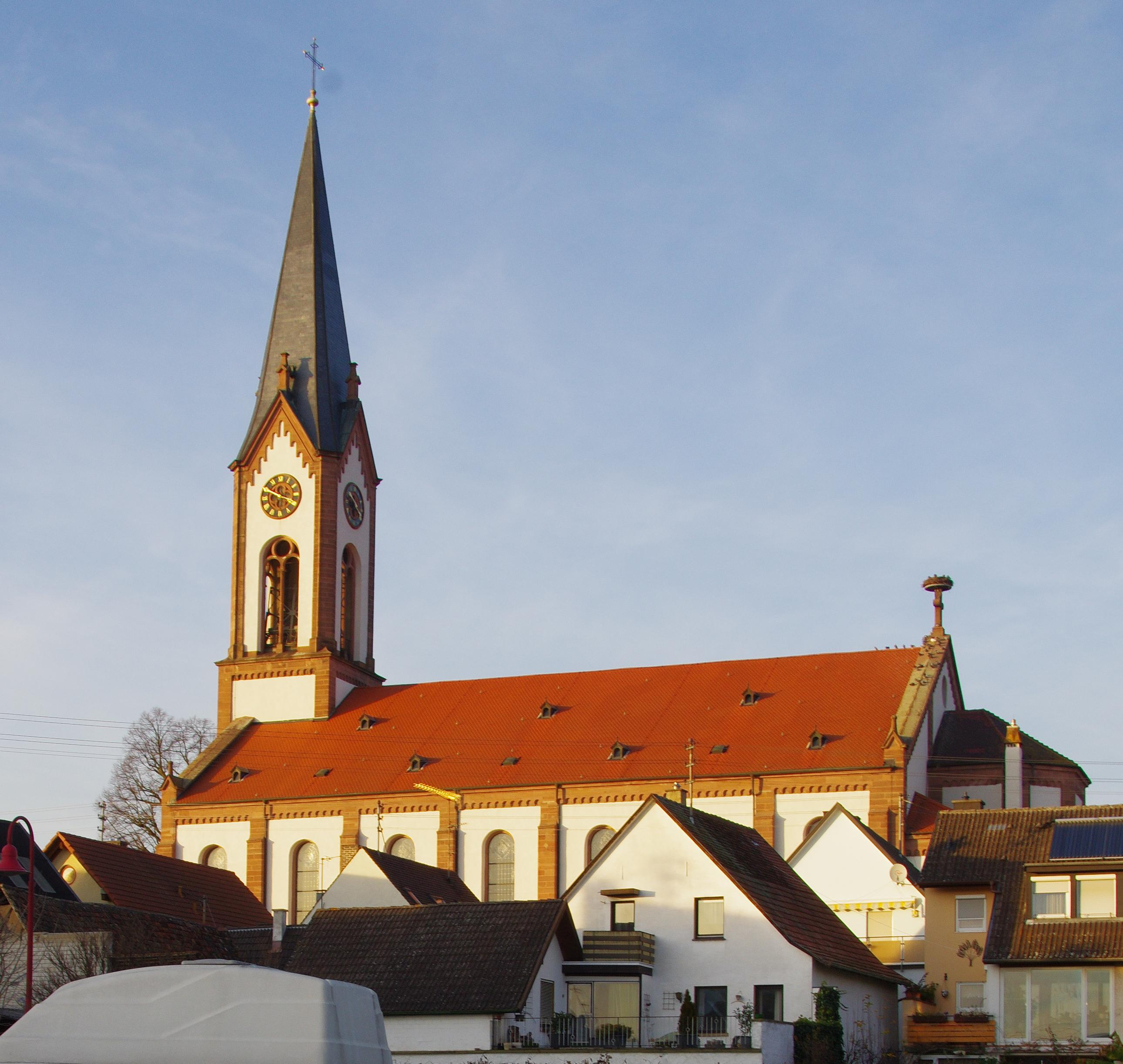 Blick von der Schulstraße auf die Ihringer Kirche